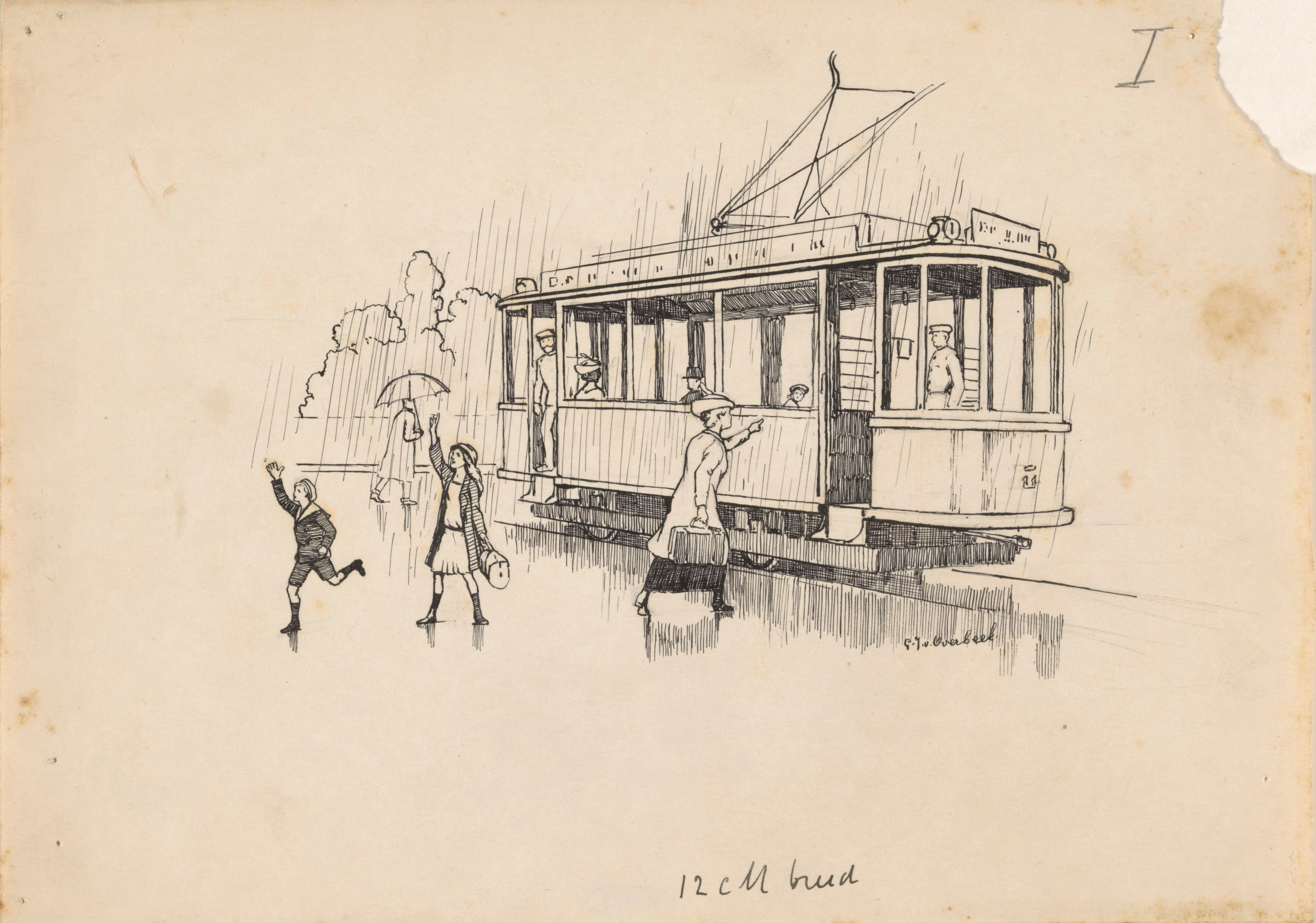 IdentificatieTitel(s): Vrouw houdt een tram aan in de regenObjecttype: tekening boekillustratie (ontwerp) Objectnummer: RP-T-2015-41-1361Opschriften / Merken: signatuur, recto, handgeschreven: ‘G.J. v. Overbeek.’nummer, recto, handgeschreven: ‘I’clichéaanwijzing, recto en verso, handgeschrevenverzamelaarsmerk, verso, gestempeld: Lugt 2228Omschrijving: Een jongen en meisje zijn uit de tram gestapt. Het meisje staat in de regen en zwaait en de jongen rent al zwaaiend weg.VervaardigingVervaardiger: tekenaar: Gijsbertus Johannes van Overbeek (eigenhandig gesigneerd)Datering: 1892 - 1947Fysieke kenmerken: pen in Oost-Indische inkt over potloodMateriaal: papier Oost-Indische inkt potlood Techniek: penAfmetingen: h 192 mm × b 271 mmOnderwerpWat: tramregenVerwerving en rechtenCredit line: Schenking van Uitgeverij L.J. VeenVerwerving: schenking 1970Copyright: Publiek domein